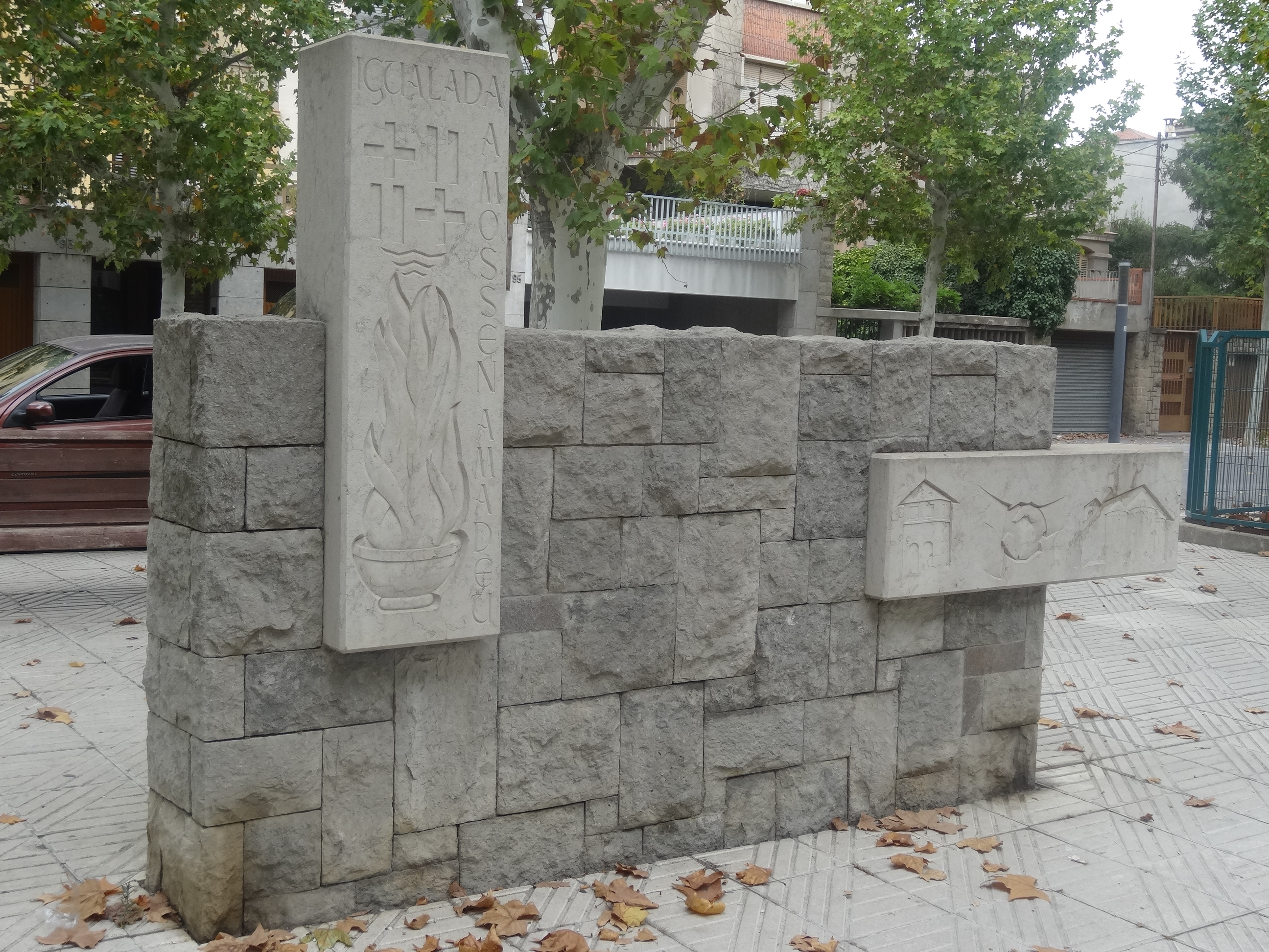 Igualada a Mossen Amadeu. Passeig de Mossèn Jacint Verdaguer (Igualada).